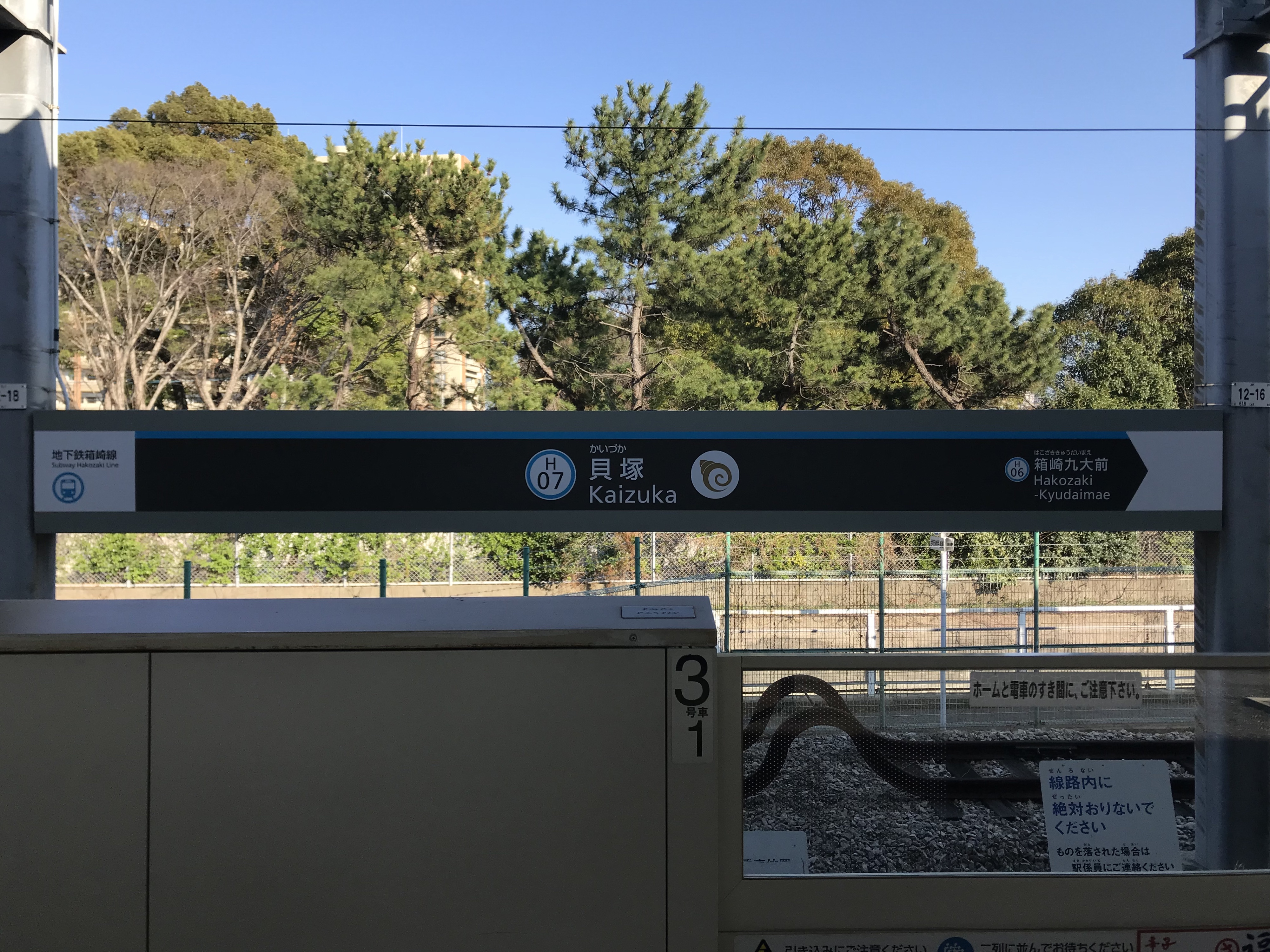 貝塚駅(福岡市営地下鉄箱崎線)の駅名標。イラストは巻貝